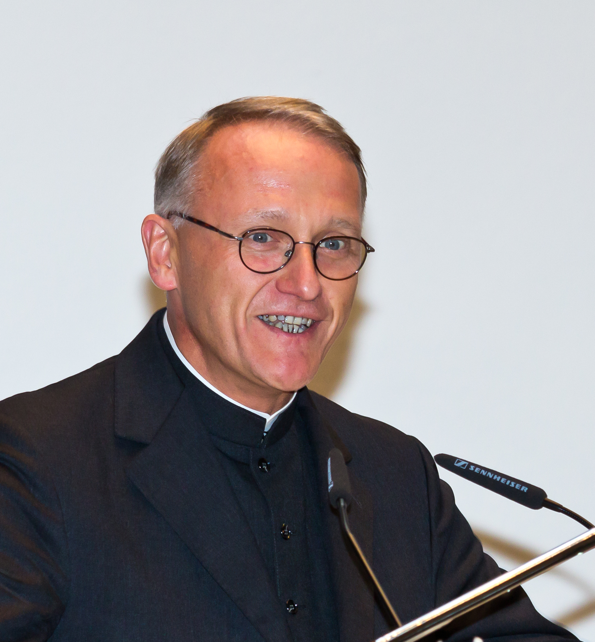 Oberbürgermeister Jürgen Roters gibt einen Empfang zur Präsentation des „Großen Schied“ im Historischen Rathaus von Köln. Das Dokument der Kölner Stadtverfassung konnte nach dem Einsturz des Historischen Archivs geborgen werden und wurde auf Initiative und mit Mitteln des Förderkreises Albertus-Magnus-Stiftung e.V. restauriert. Foto: Prof. Dr. Marc-Aeilko Aris, Lehrstuhl für lateinische Philologie des Mittelalters der Ludwig-Maximilians-Universität München und Direktor des Albertus Magnus-Instituts Bonn, referiert zum Thema des Abends „Köln und die Kommunale Revolution im 13. Jahrhundert: Der Große Schied und sein Schlüssel Albert der Große“